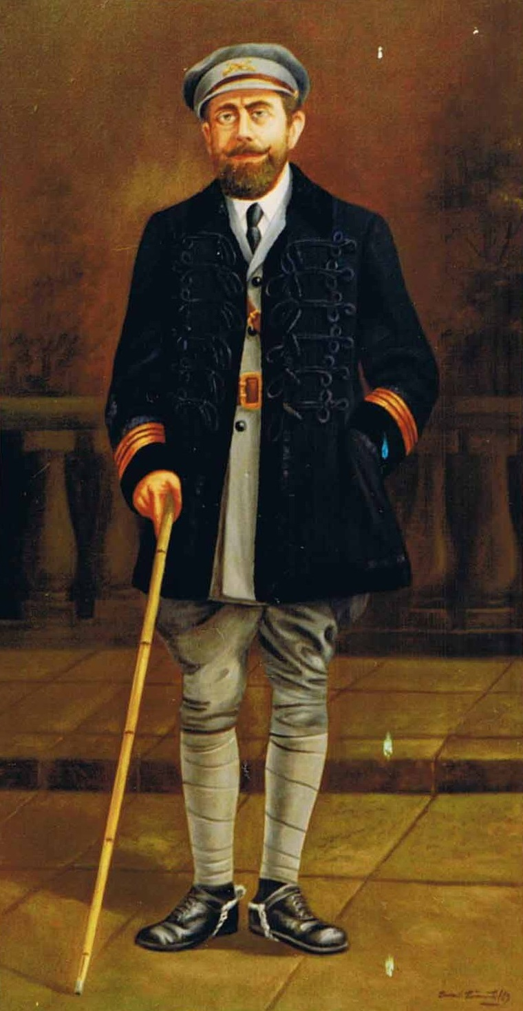 Retrato a oleo do Coronel Ferreira do Amaral, elaborado pelo artista Duarte Pimentel - Localização: Comando geral da PSP